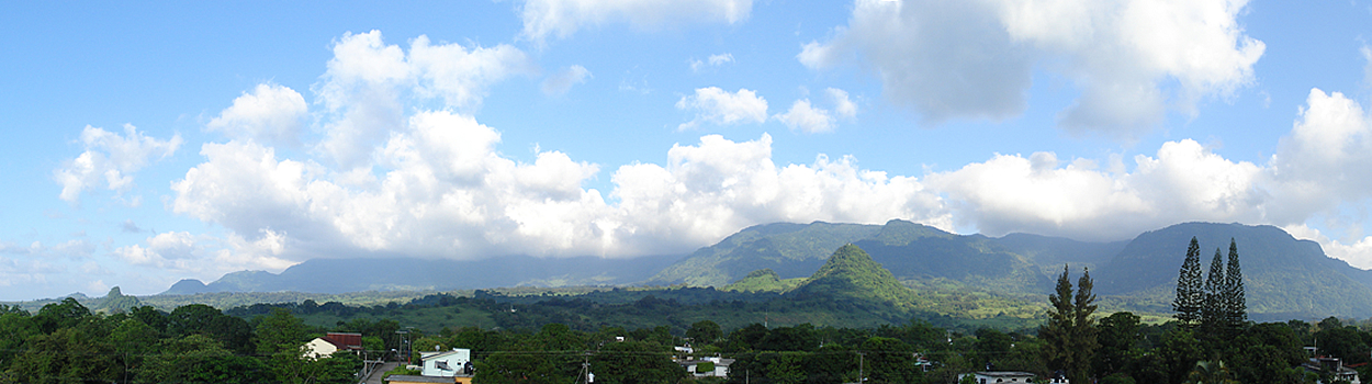 Imagen panoramica de la Sierra de Otontepec vista desde Chontla, Veracruz